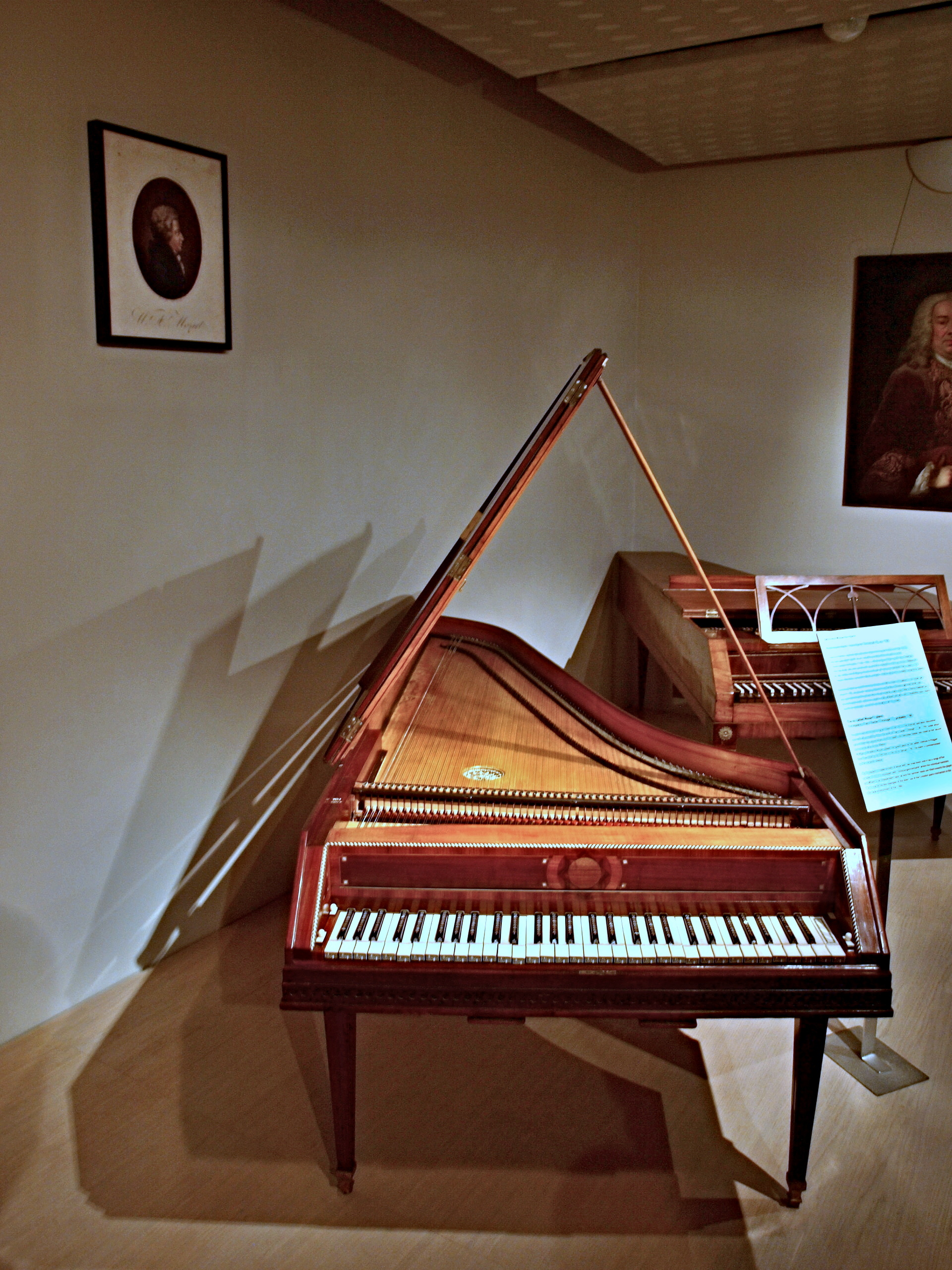 Mozartův klavír